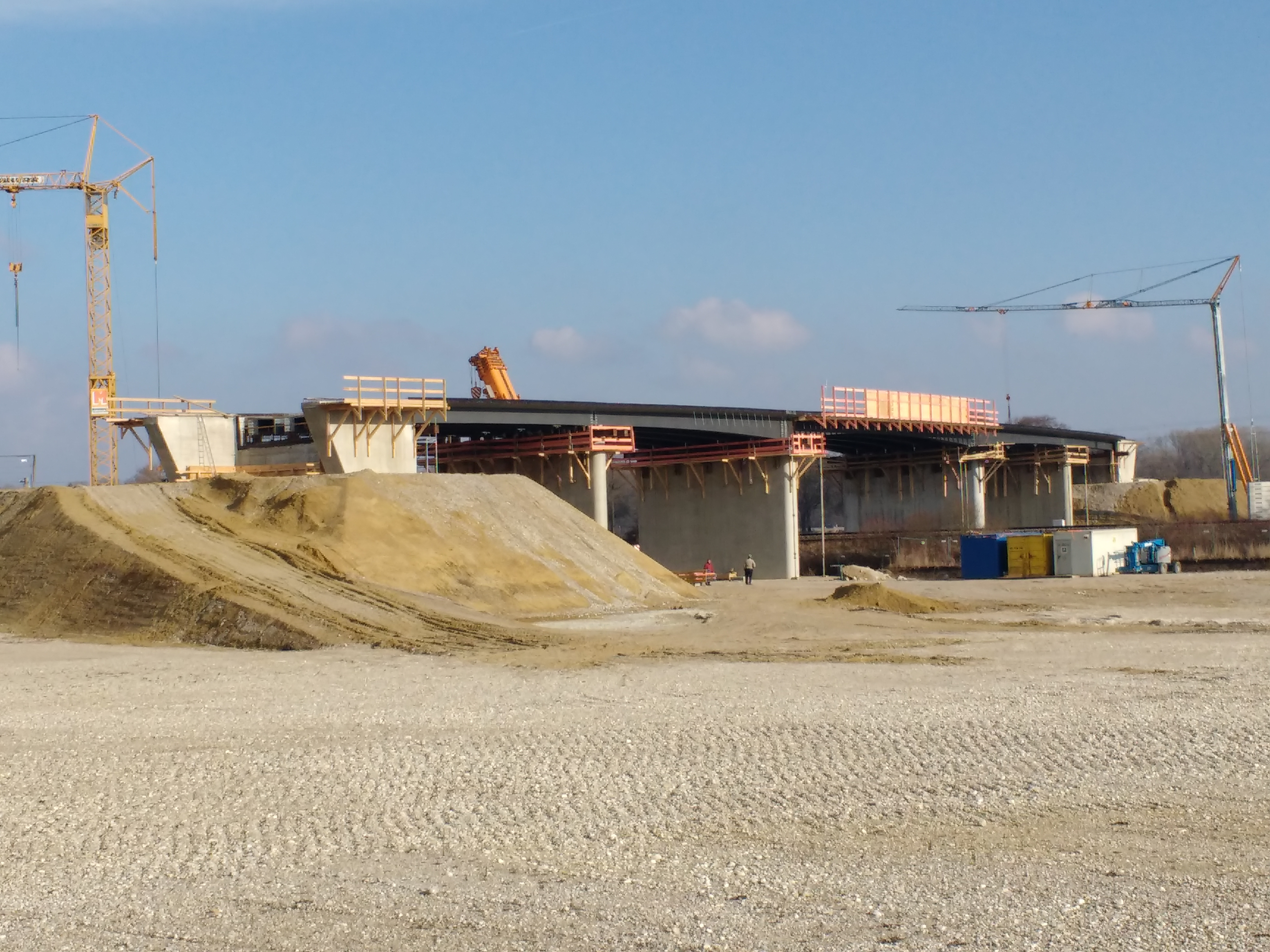 Westtangente Freising, Bau der Bahnbrücke im Februar 2017